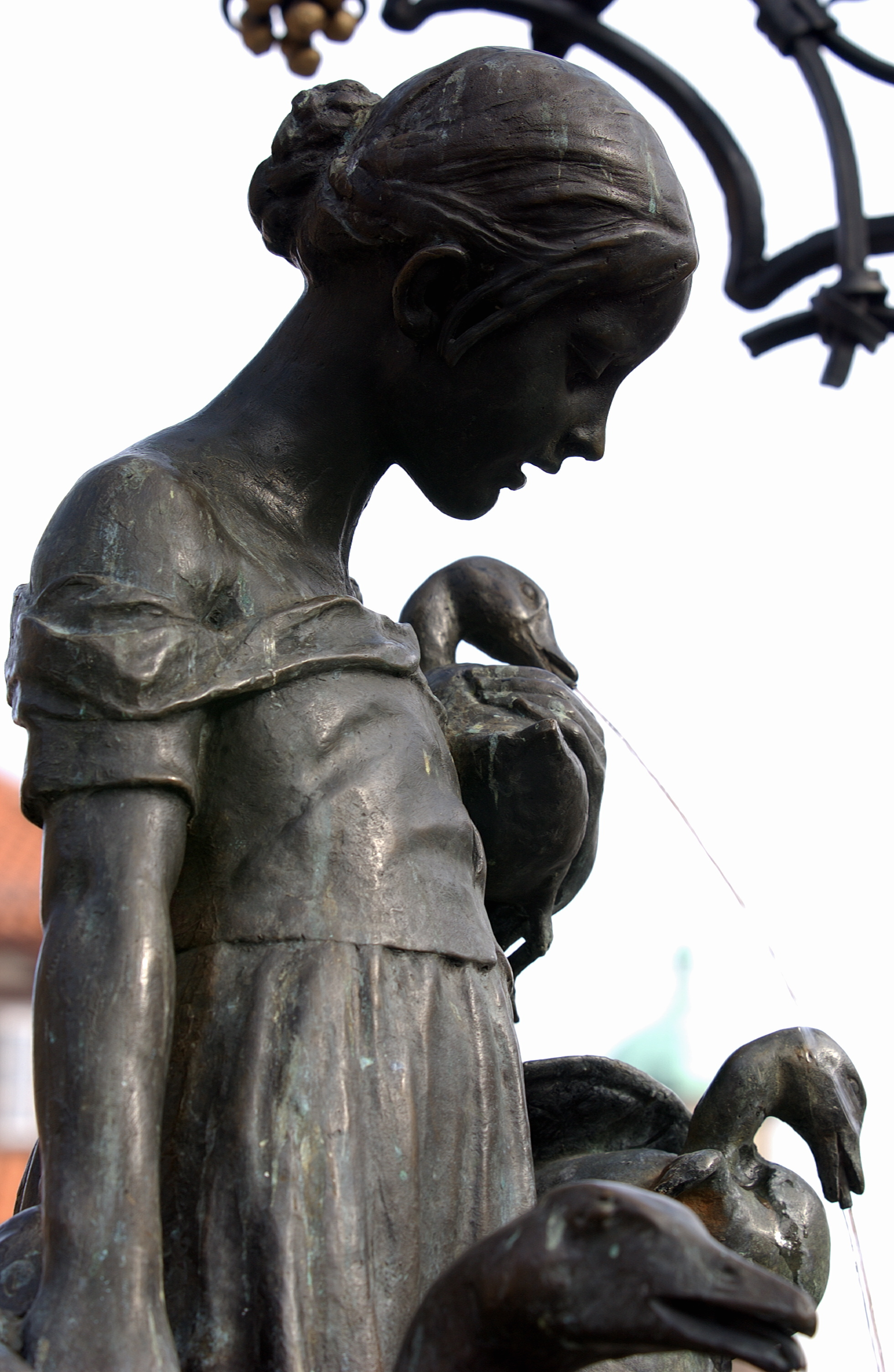 Goettingen, Goose Girl